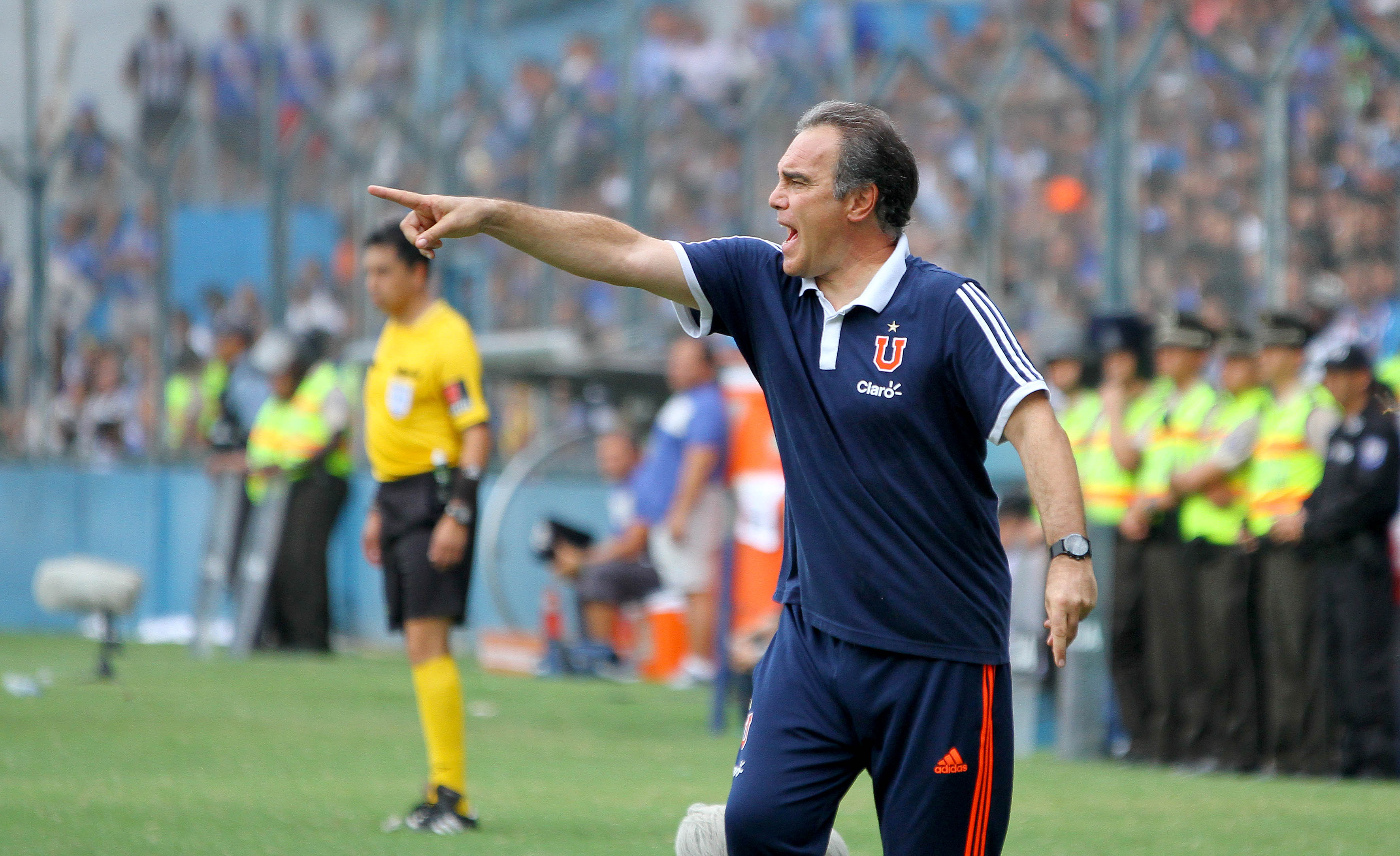 Guayaquil, 22 de abr (Andes).-Martín Lasarte entrenador de la Universidad de Chile dirige al equipo durante el encuentro frente a Emelec en el estadio Capwell Foto:César Muñoz/Andes